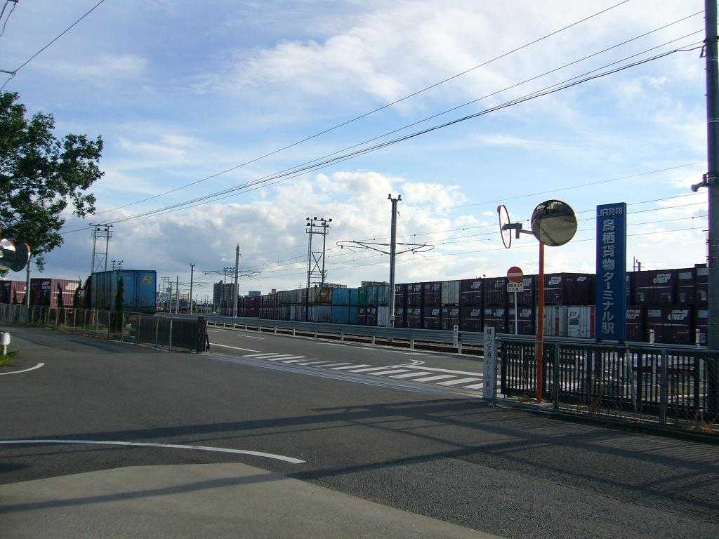 鳥栖貨物ターミナル駅 This photograph is a battery lithium CR-V3.